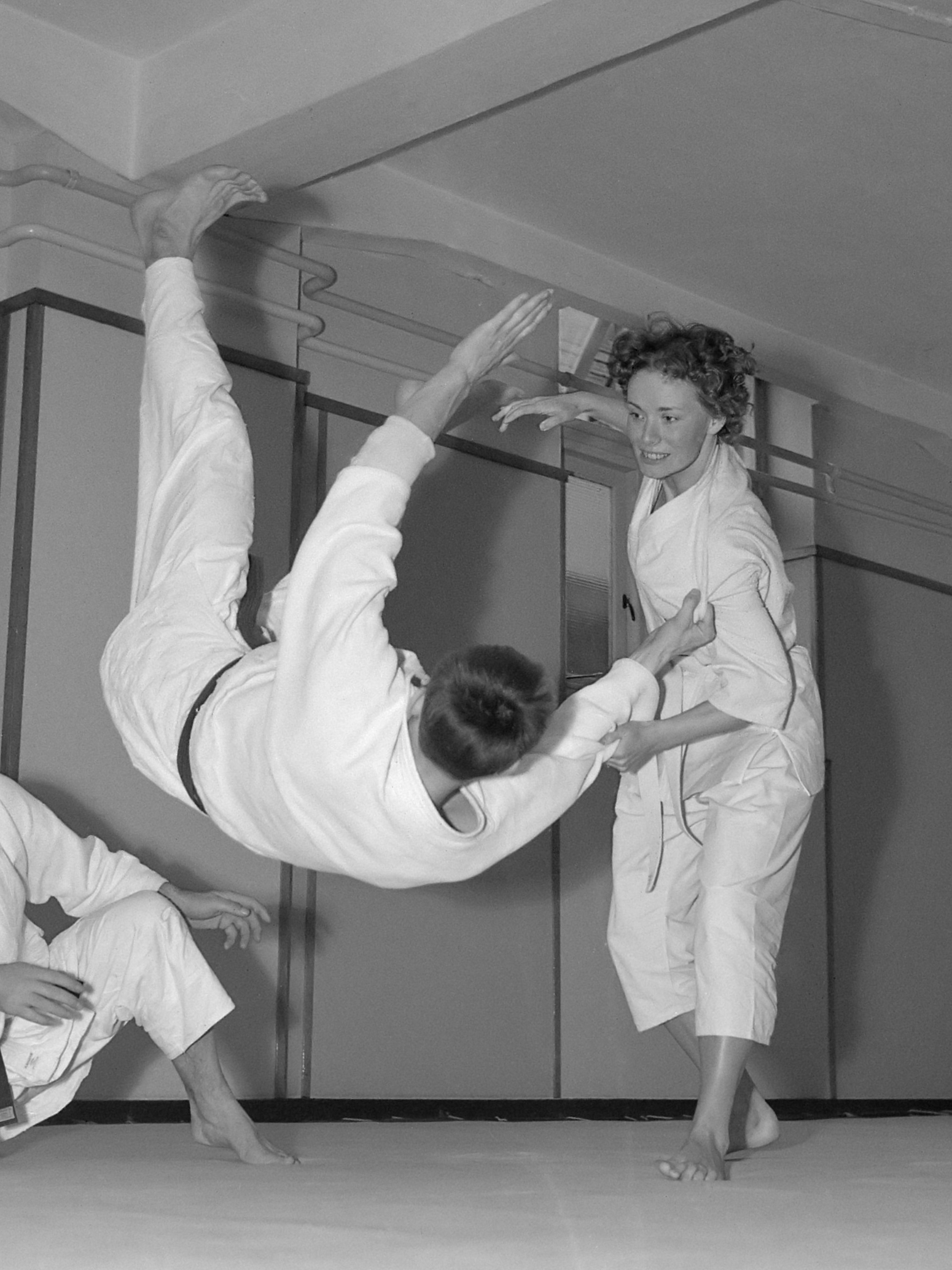 Judoserie met Tweede Kamer lid Mevrouw van Someren 26 februari 1961